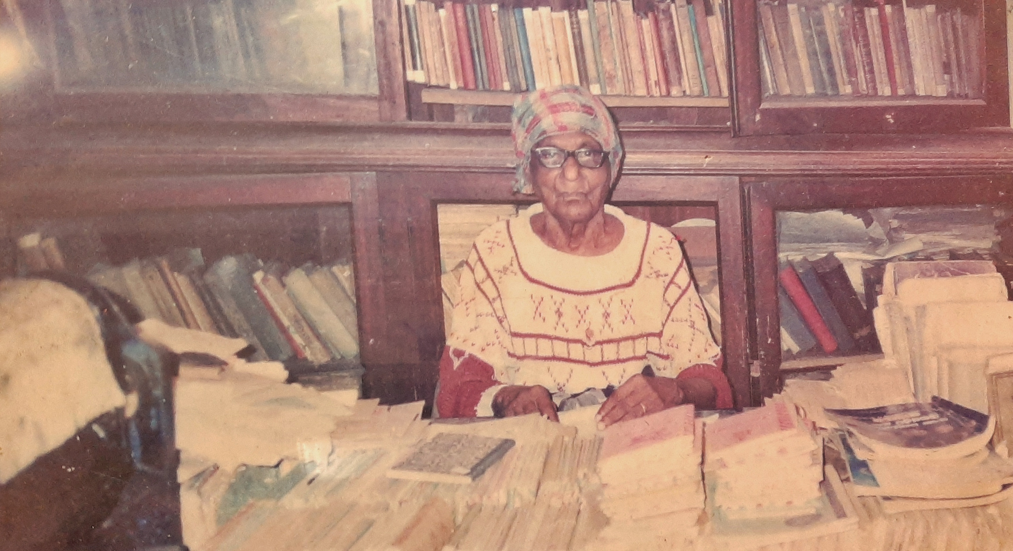 සිංහල: ශ්‍රී ලාංකික ජ්‍යොතිෂ ග්‍රන්ථ කතුවරයෙක් හා ජ්‍යොතිෂවේදියෙක් වන එස්. ඩබ්ලිව්. කස්තුරිරත්න මහතා